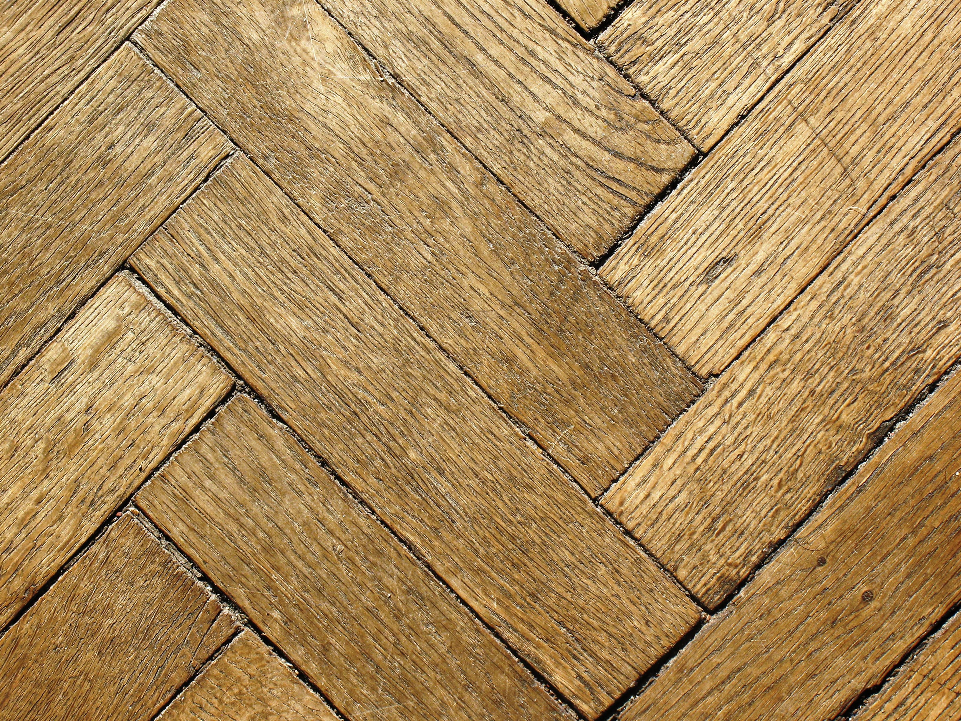 Old parquetry 1930s, USSR.